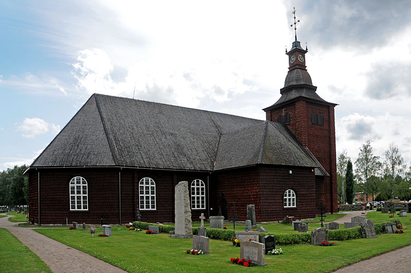 Ekshärads kyrka i Ekshärads församling, Karlstads stift